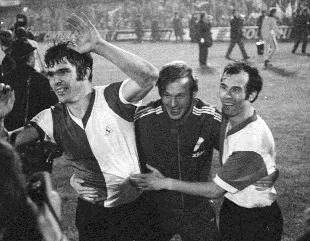 Celtic tegen Feijenoord 1-2 finale Europacup-I in Milaan: juichende spelers v.l.n.r. Wim van Hanegem, Piet Vrauwdeunt, Coen Moulijn